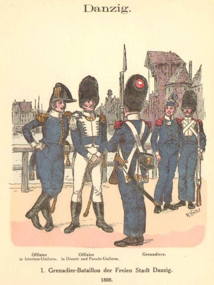 Grenadierzy napoleońskiego Wolnego Miasta Gdańska.